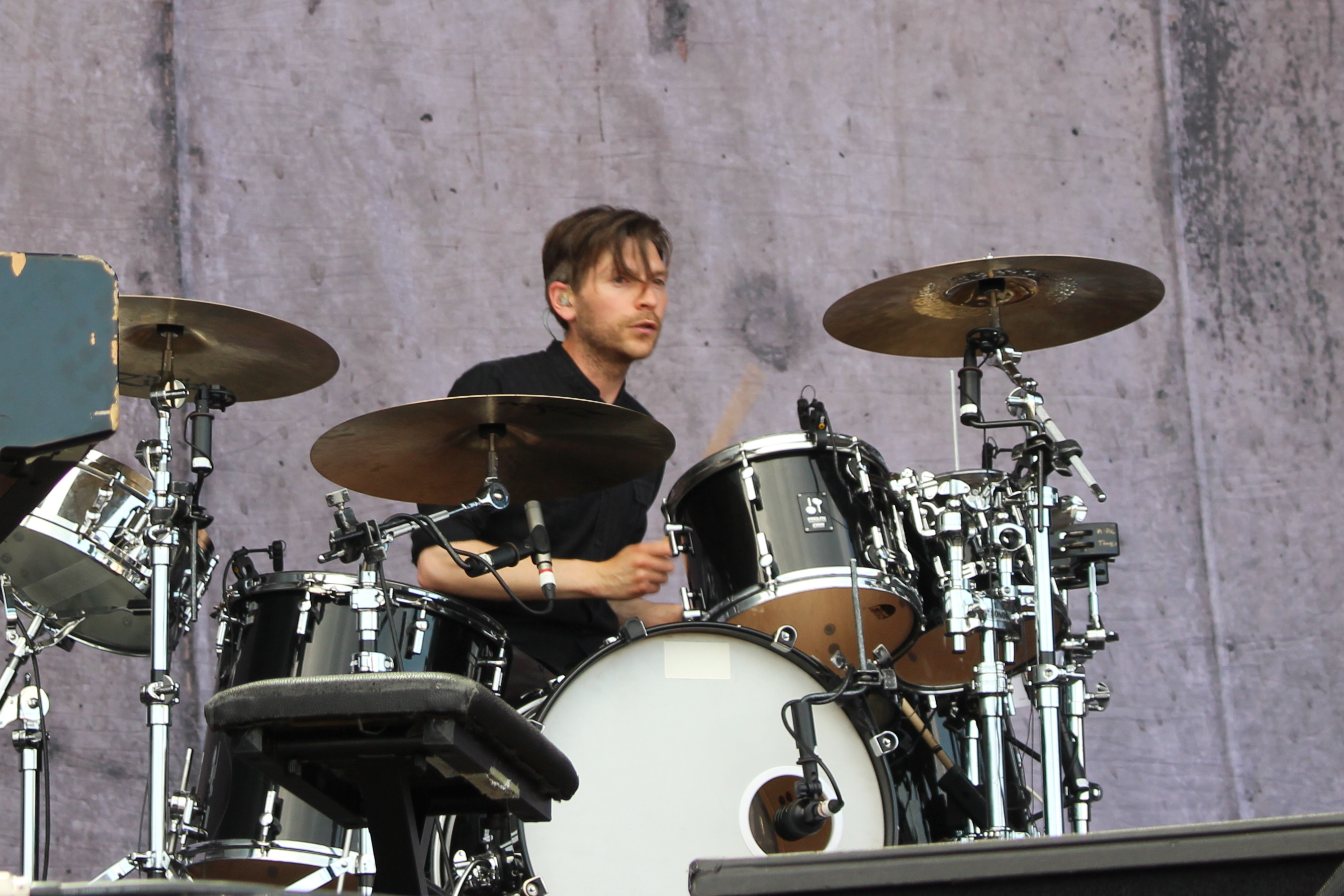 Festivalsommer This photo was created with the support of donations to Wikimedia Deutschland in the context of the CPB project "Festival Summer". Personality rights warningAlthough this work is freely licensed or in the public domain, the person(s) shown may have rights that legally restrict certain re-uses unless those depicted consent to such uses. In these cases, a model release or other evidence of consent could protect you from infringement claims.